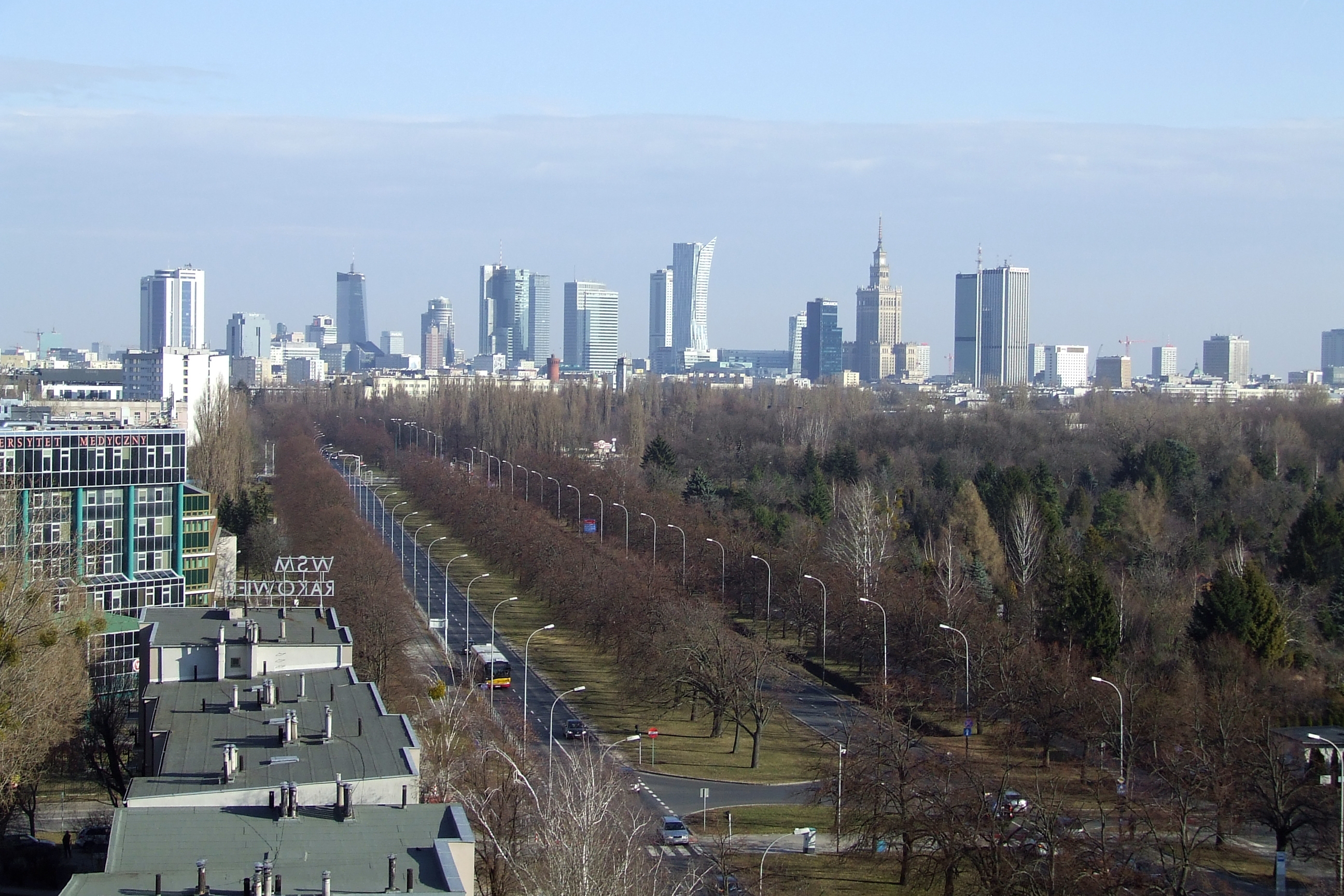 Pałac Kultury i Nauki widziany z 10 piętra bloku przy ul. Żwirki i Wigury 53